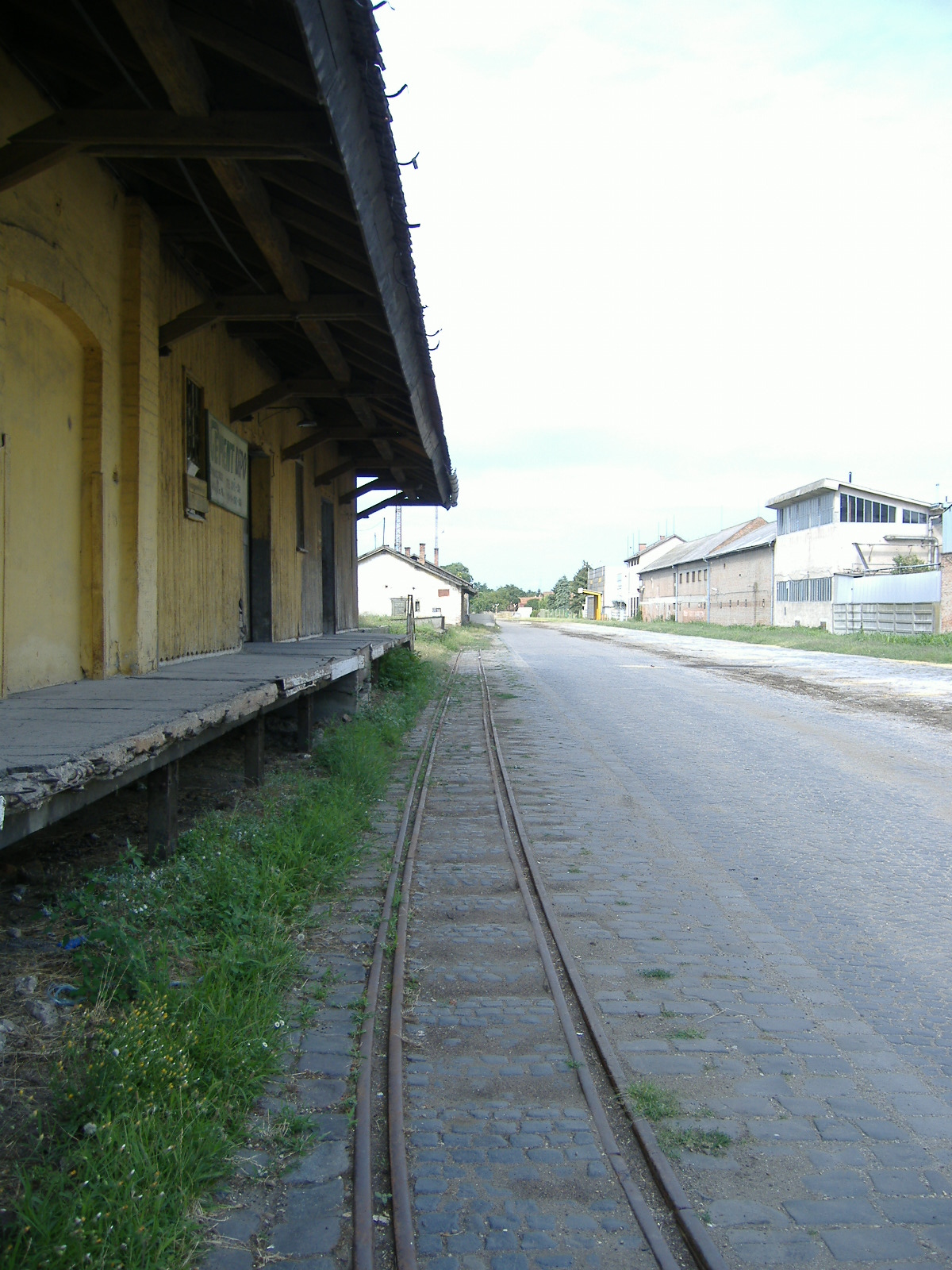 Az Alföldi Kisvasút (Alföldi Első gazdasági Vasút) megmaradt rakodóvágánya Orosháza MÁV állomásán.